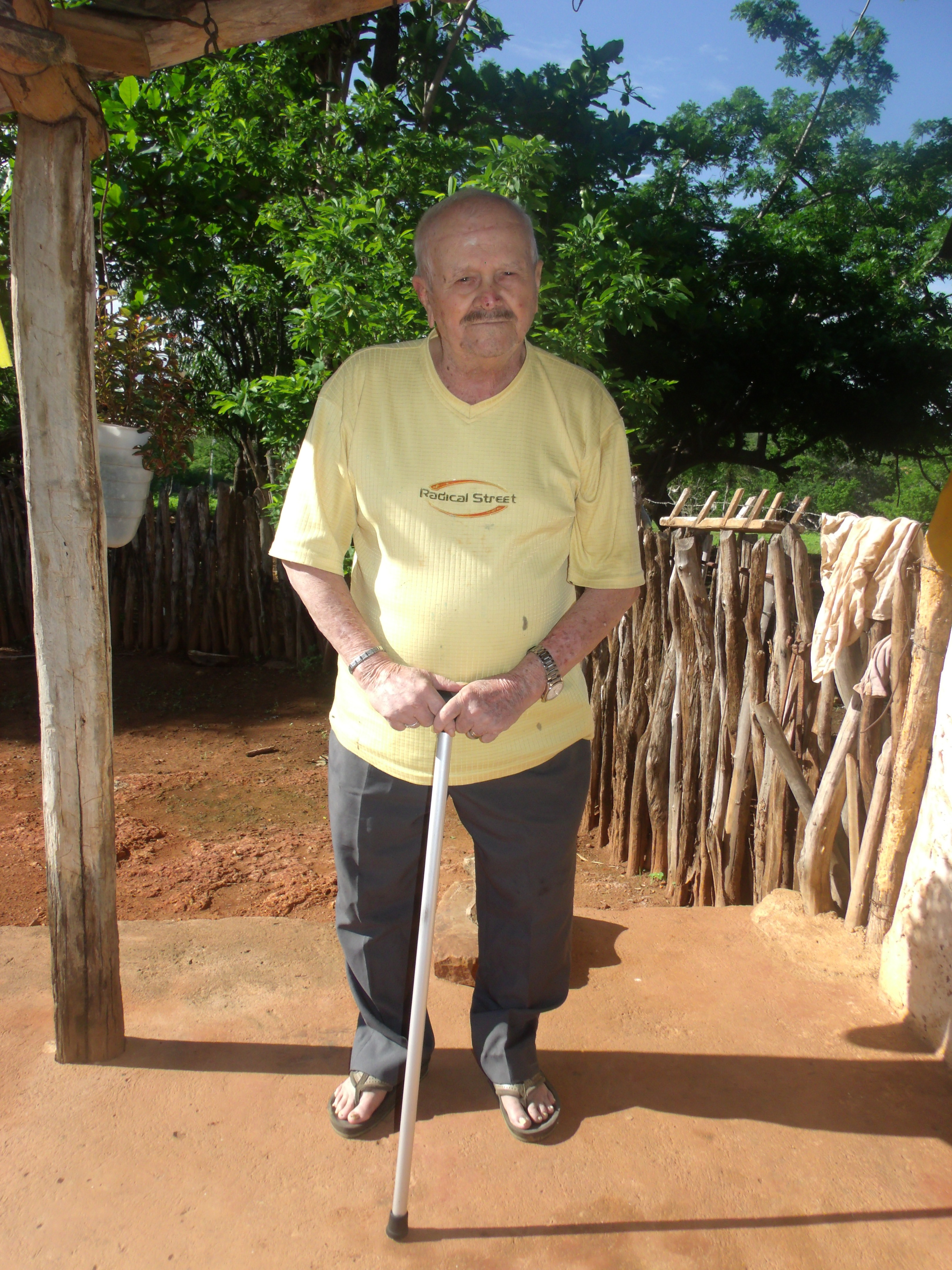 Iraldo Amador da Silva, ex-prefeito de Alcântaras-Ceará, em janeiro de 2016.